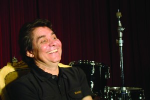 Músico brasileiro Lô Borges em imagem do acervo da TV Brasil.